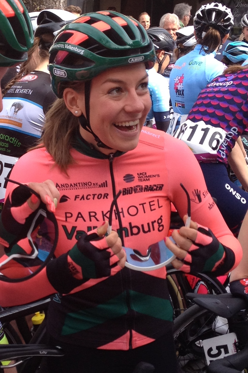 Volta Limburg Classic 2019 voor vrouwen met start en finish in Eijsden, Limburg, Nederland